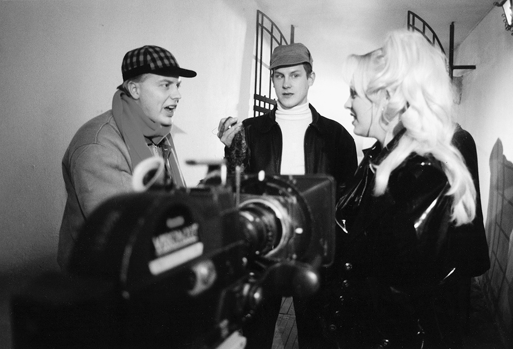 Jan Uuspõld